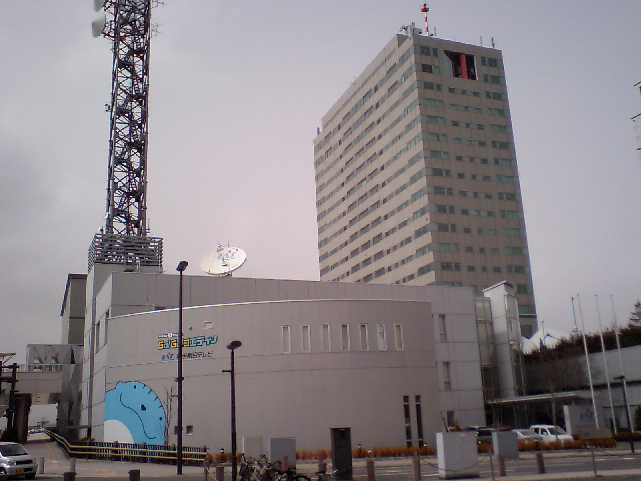 IAT 岩手朝日テレビ